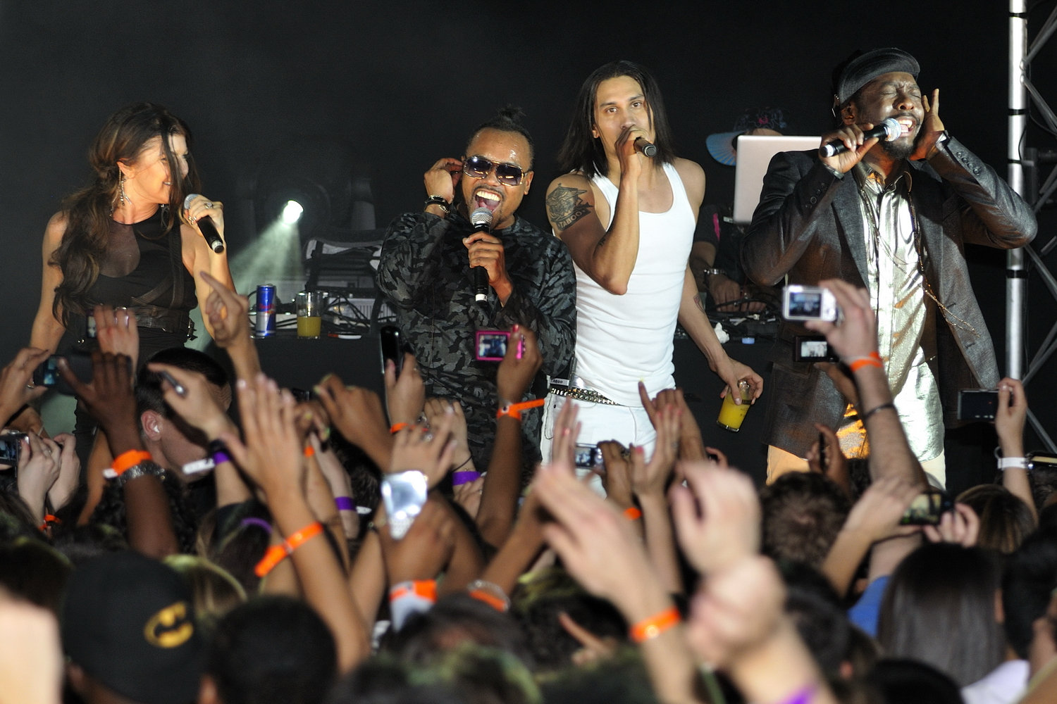 Les Black Eyed Peas en concert privé au VIP Room Paris. avec will.i.am, apl.de.ap, Taboo et Fergie